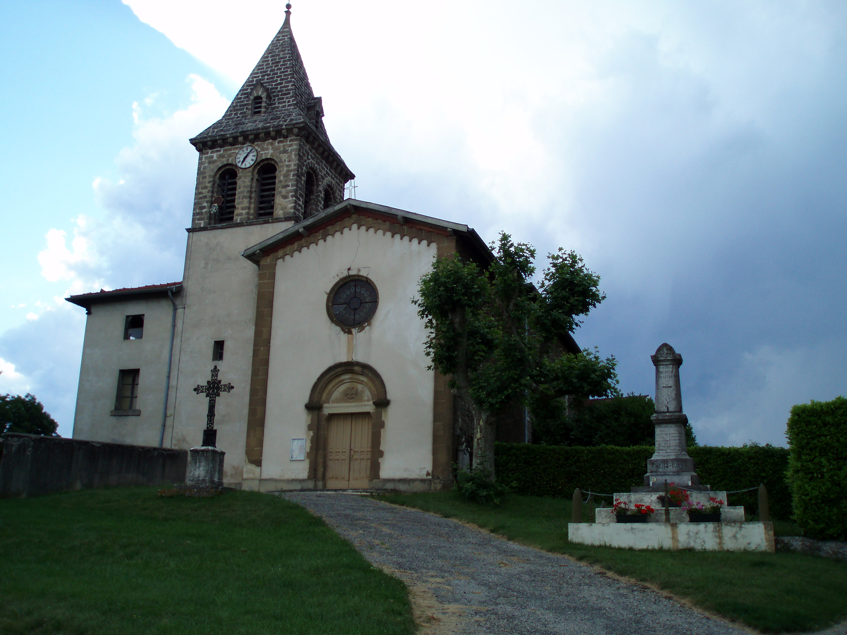 Eglise et Monument aux Morts